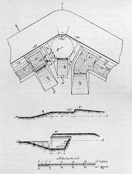 Данное изображение было использовано в статье «Барбет» опубликованной в четвёртом томе «Военной энциклопедии», который был издан книгоиздательским товариществом Ивана Дмитриевича Сытина в 1911 году в столице Российской империи городе Санкт-Петербурге.